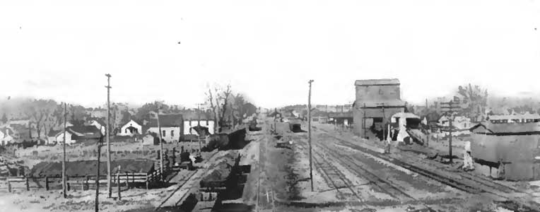 Virden, Illinois, c.1900